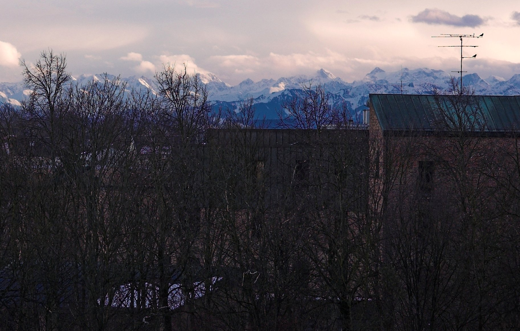 Teile der Wilheim-Busch-Realschule in Neuperlach vor Alpenkulisse